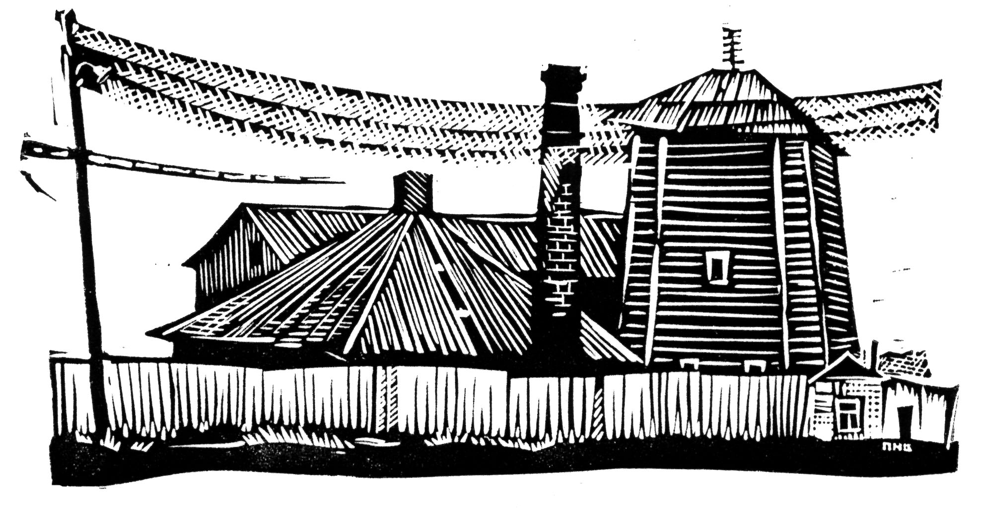 «Сользавод», гравюра (Соликамск), 1990-е